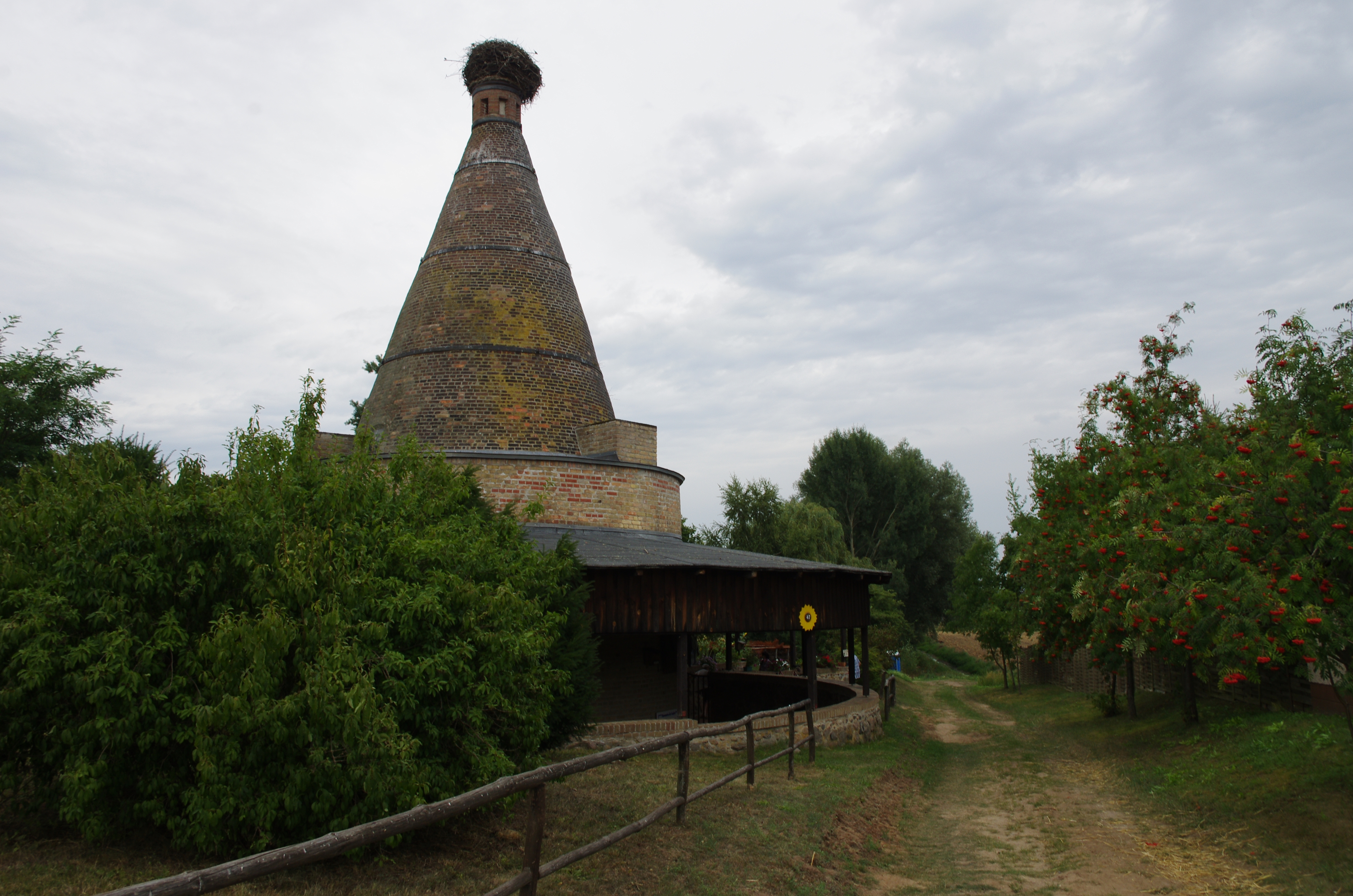 Wriezen in Brandenburg. Das Storchenmuseum in Altgaul steht unter Denkmalschutz.